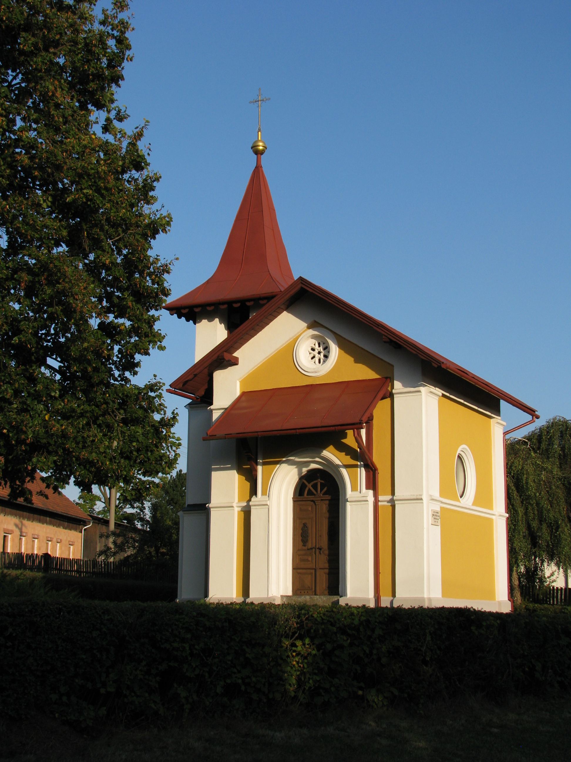 Radešín - kaplička